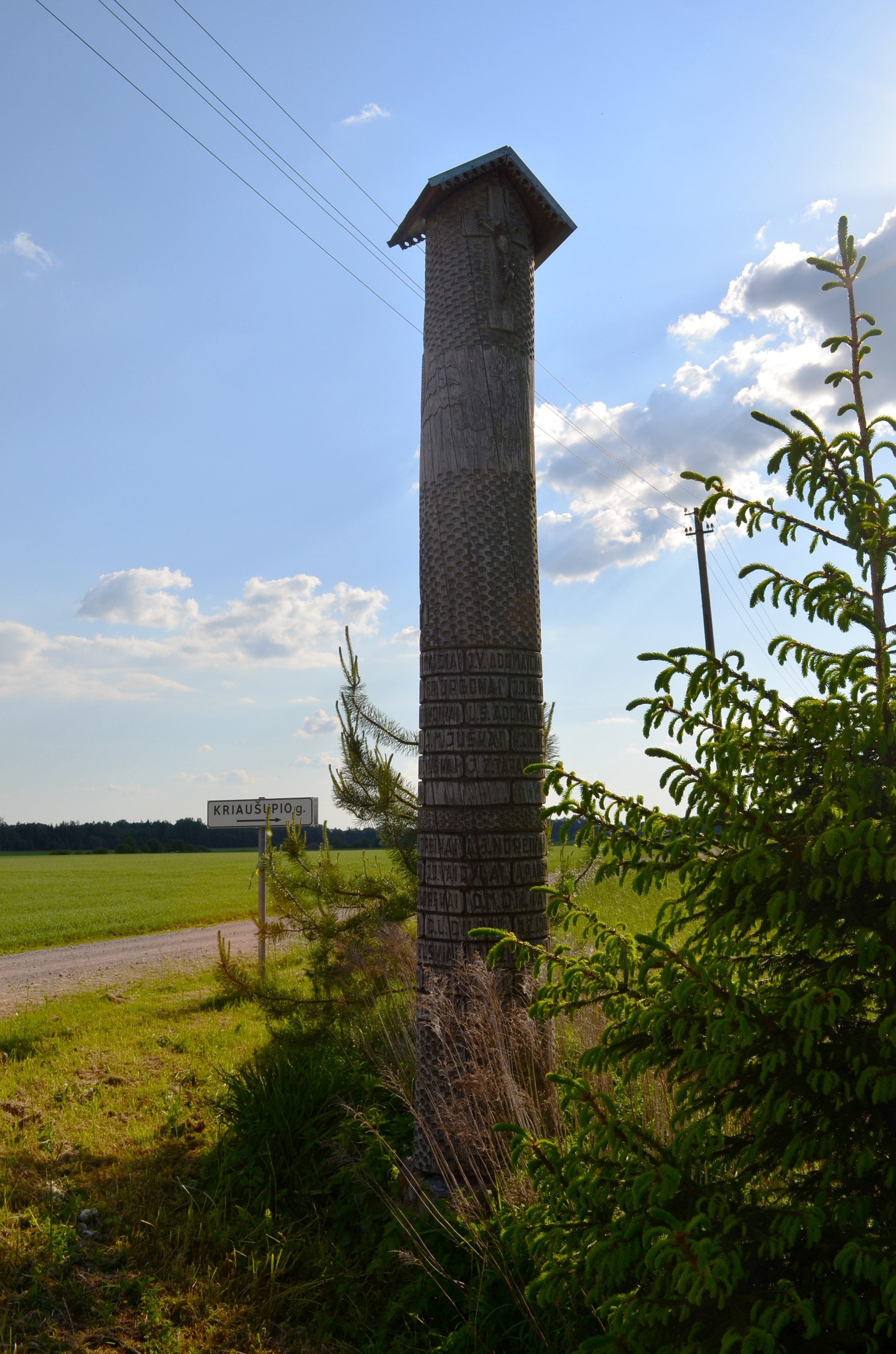 Giminių atminimo stulpas, Bajėnai I, Kėdainių raj.